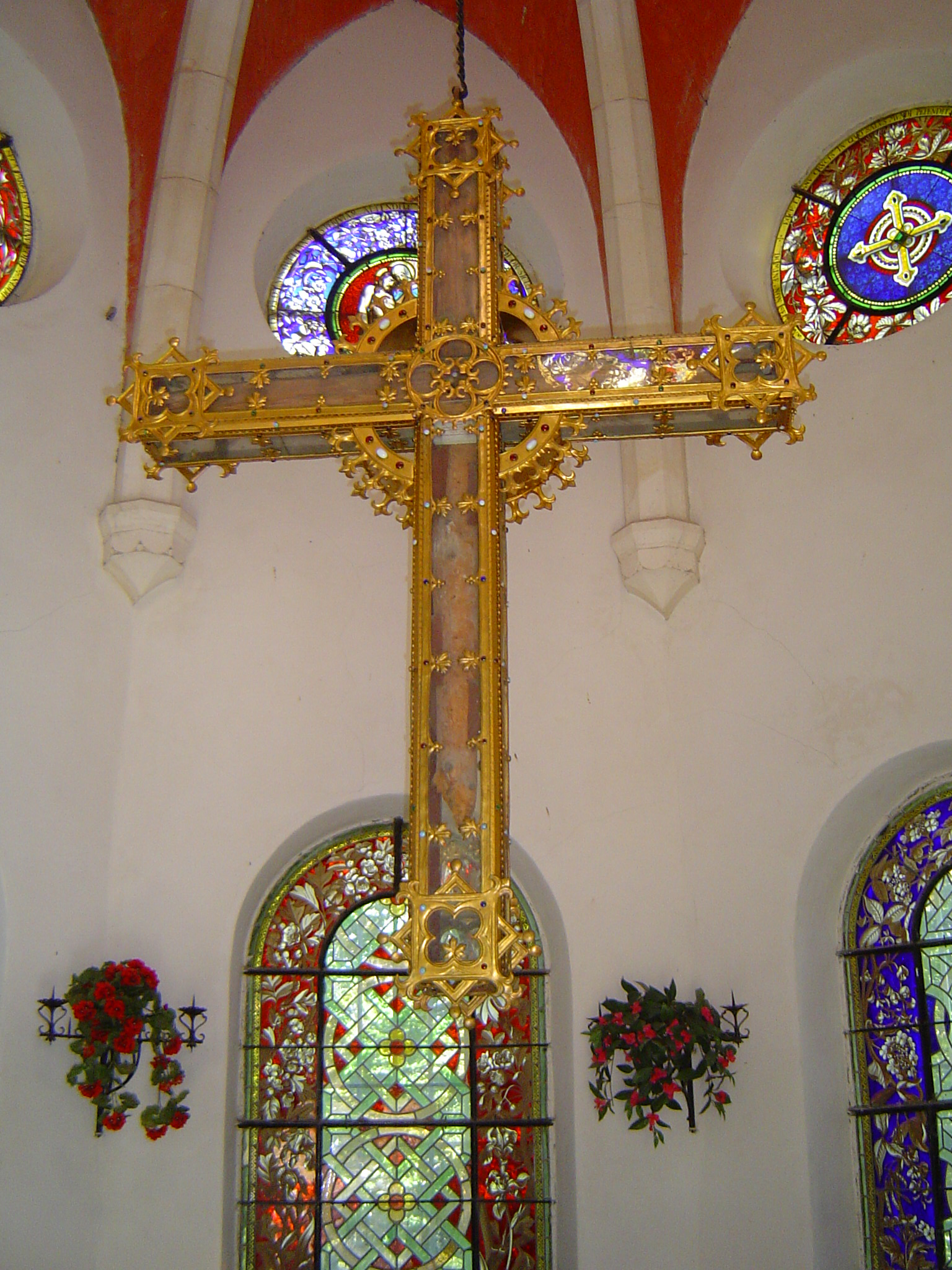 Photo prise à Notre-Dame-du-Laus